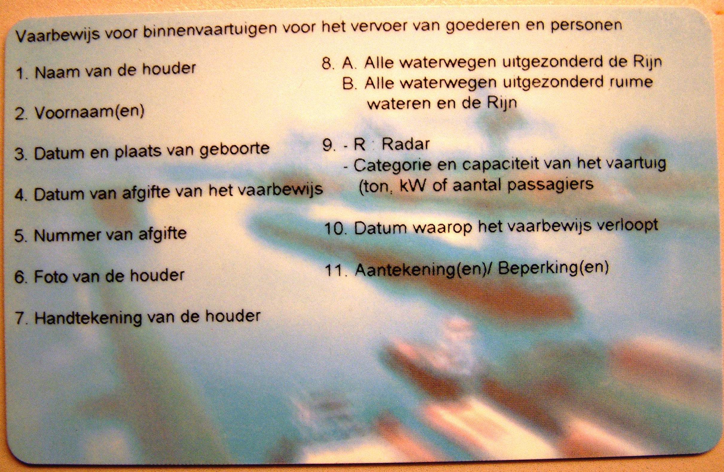 Achterkant van een Nederlands groot vaarbewijs Categorie:Binnenvaart